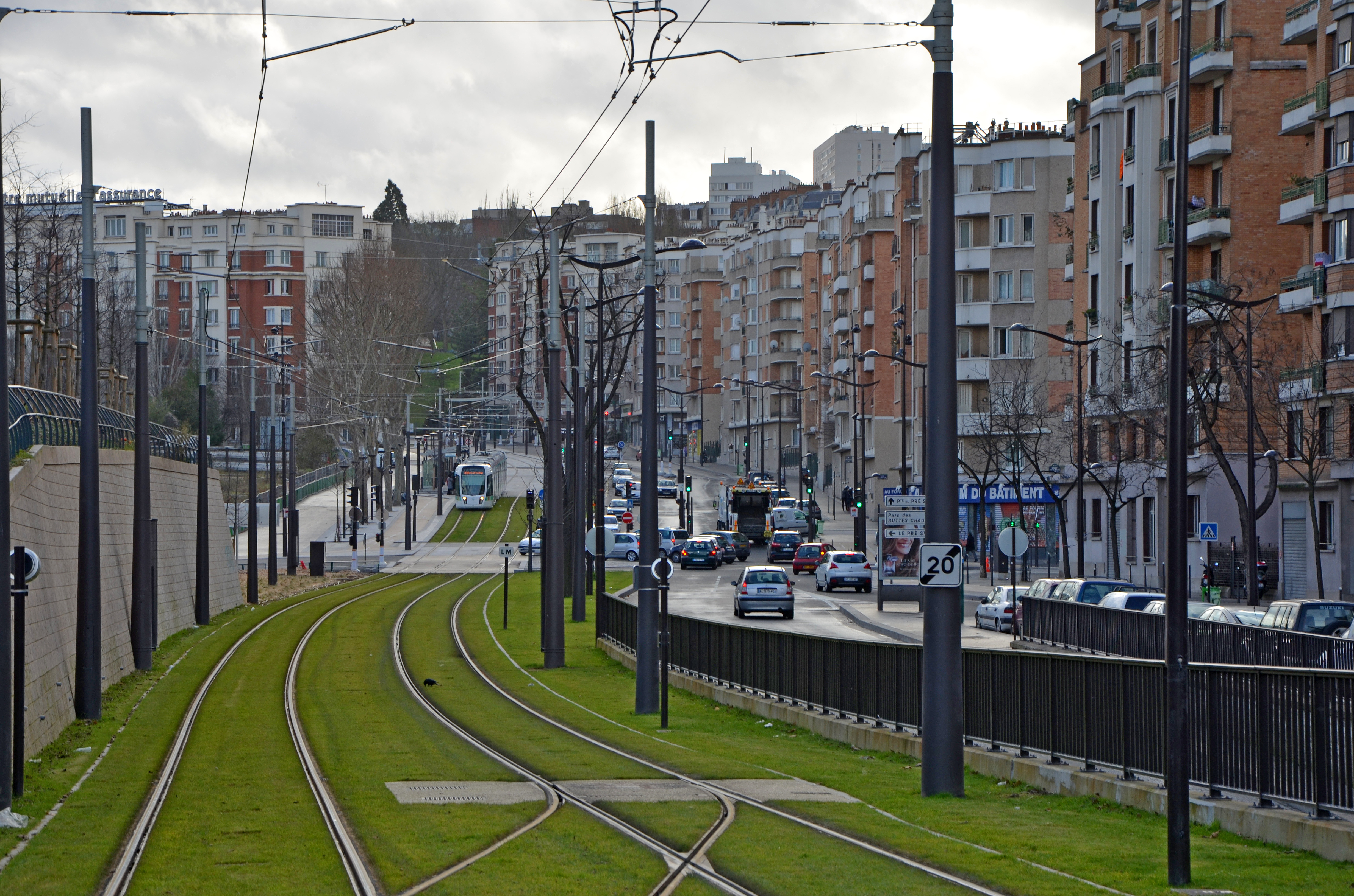 Rame de tramway de la ligne T3b boulevard d'Indochine entre la porte de Pantin et la porte de Chaumont Paris, Ile de France, France